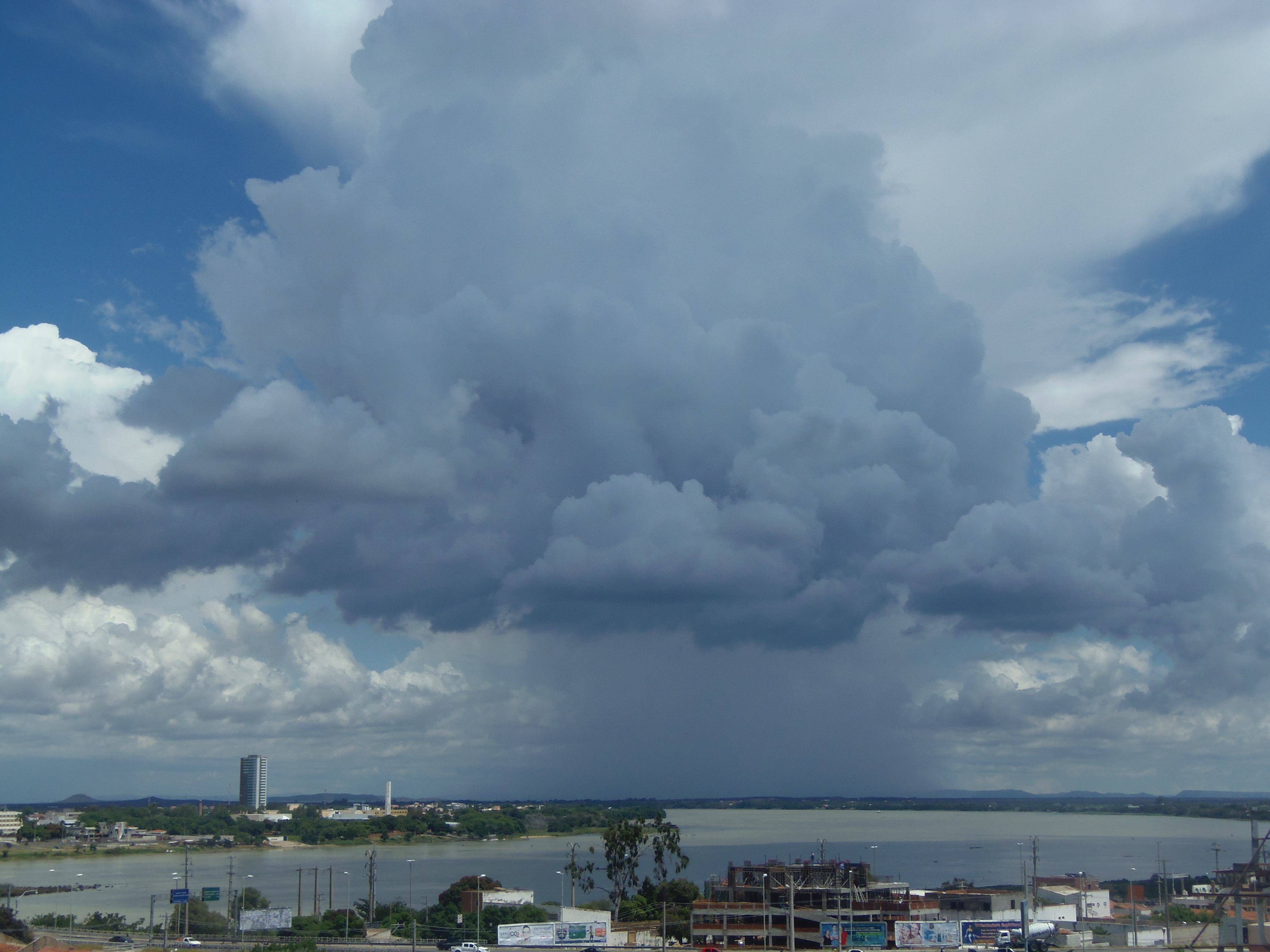 Distrito Industrial, Petrolina - PE, Brazil